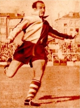 Eduardo Di Loreto, futbolista argentino, vistiendo la casaca de Tolouse FC